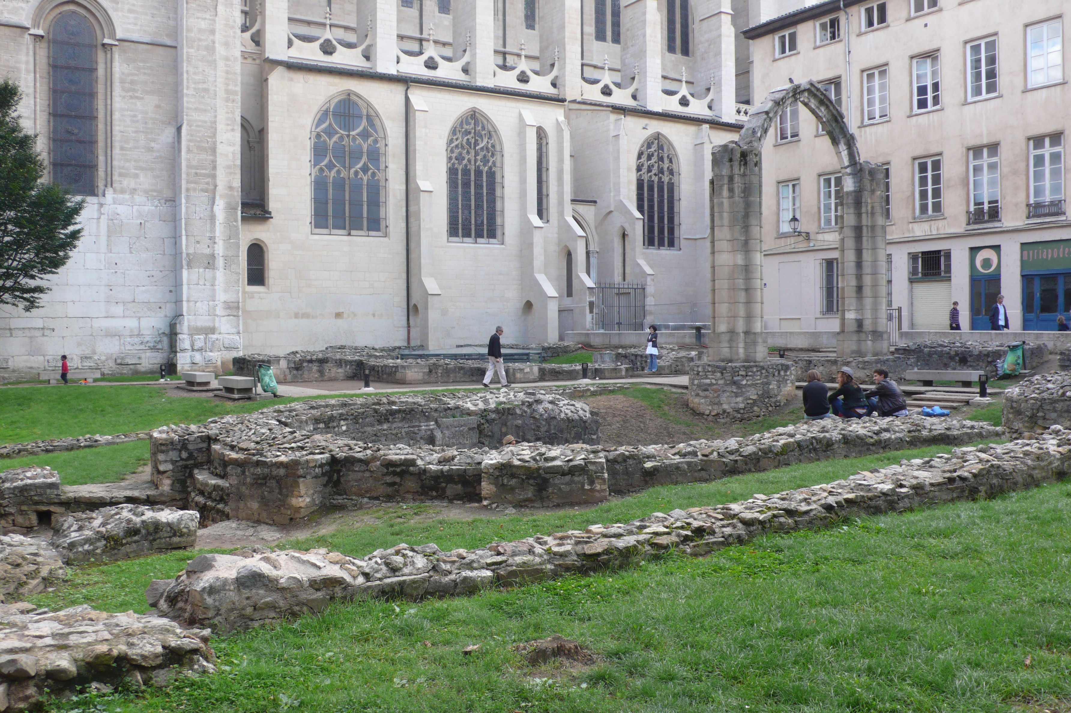 Groupe épiscopal en rive droite de la Saône (rue de la Bombardé, rue des Estrées, F-69005 Lyon). Daté du 4e s., au 5e s. il devient le nouveau centre monumental de Lugdunum et le siège officieux du pouvoir politique local.